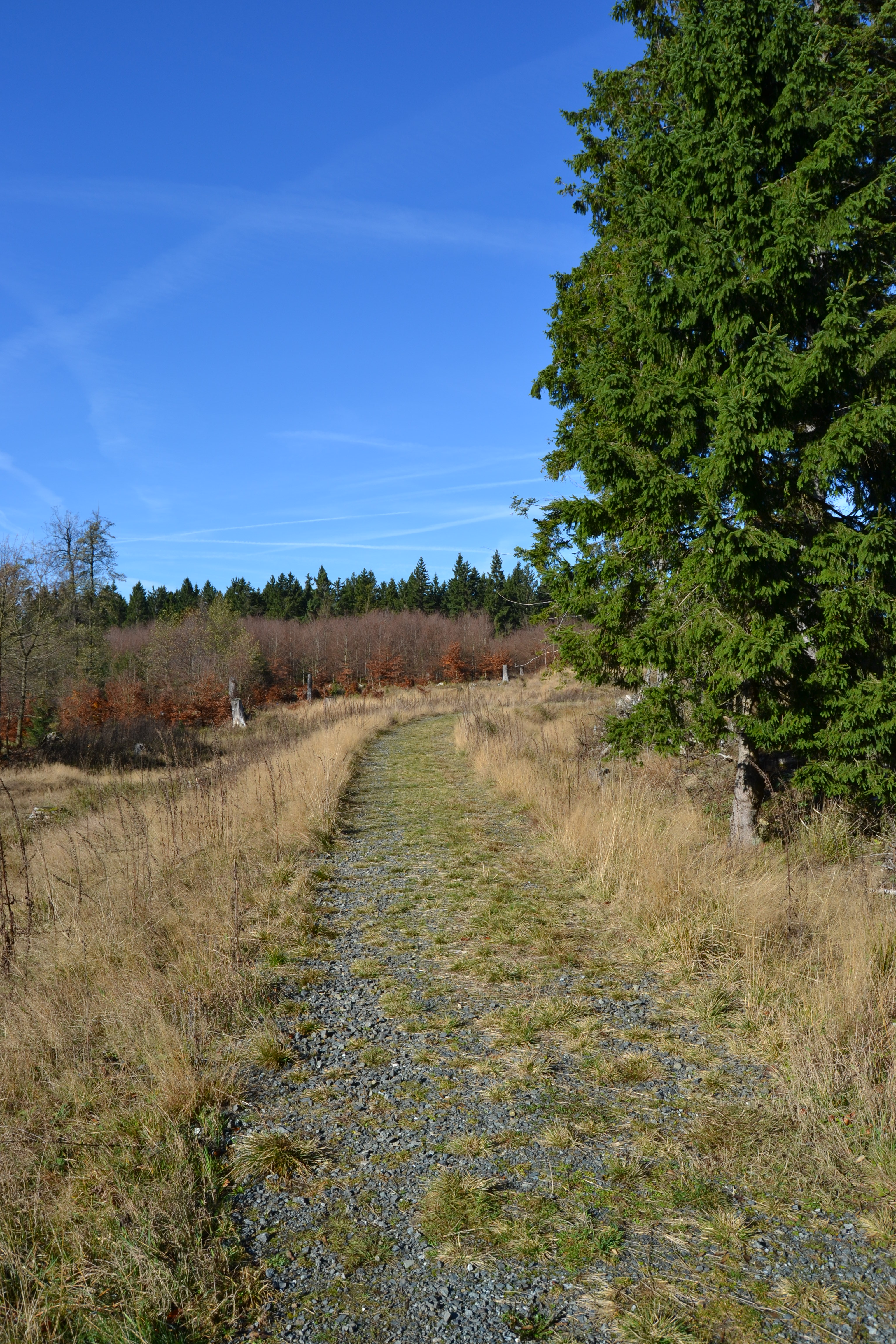 Trasse des Südharz-Eisenbahn-Radwanderweges auf der ehemaligen Bahntrasse kurz vor dem Scheitelpunkt zwischen Kaiserweg und Brunnenbachsmühle, Blick Richtung Brunnenbachsmühle